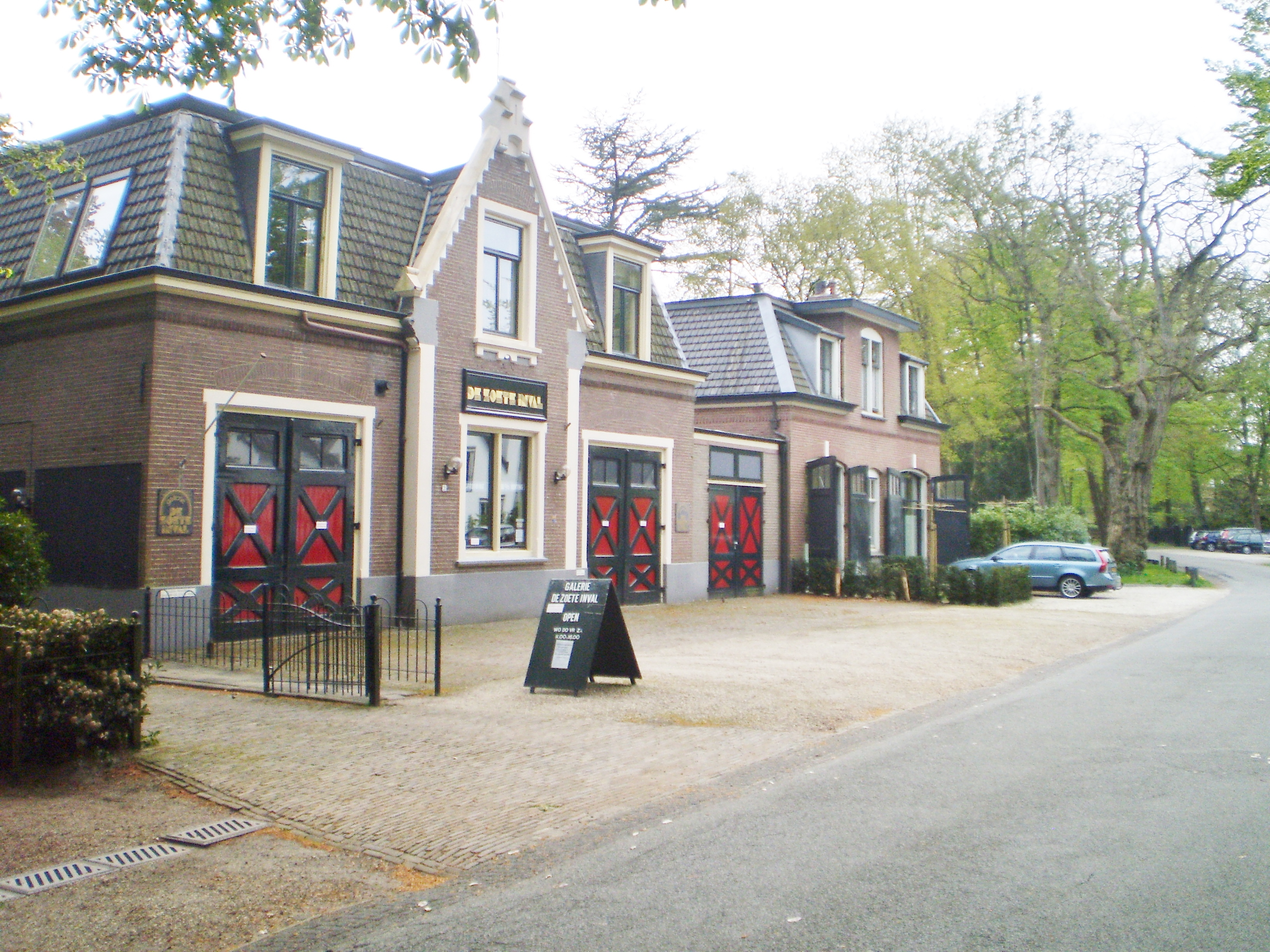 vroegere koetshuizen, eerder behorende bij het Badhotel